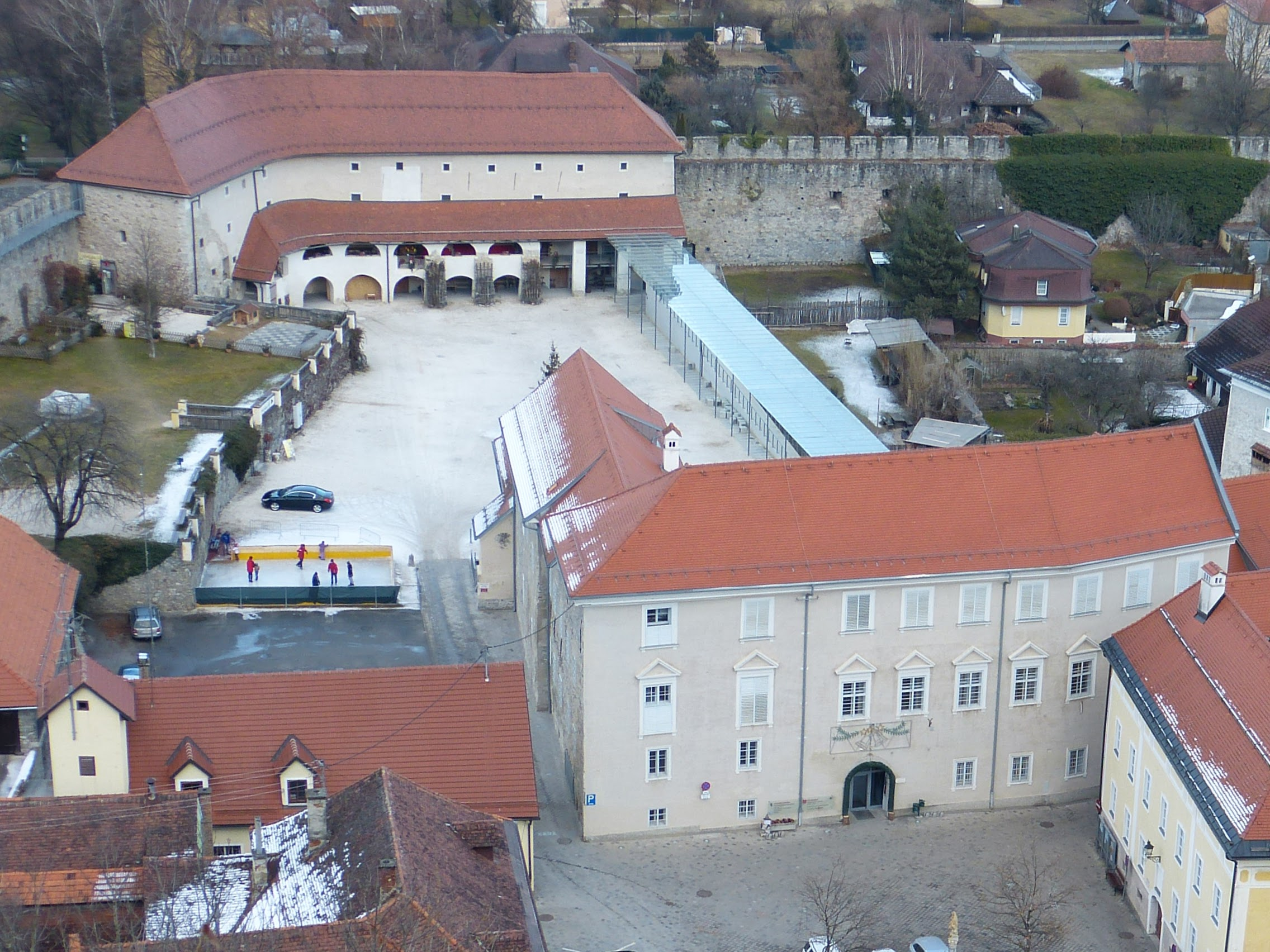 Fürstenhof (Neues Rathaus und Hofbereich), im Hintergrund Speichergebäude. Beide Gebäude sind denkmalgeschützt.